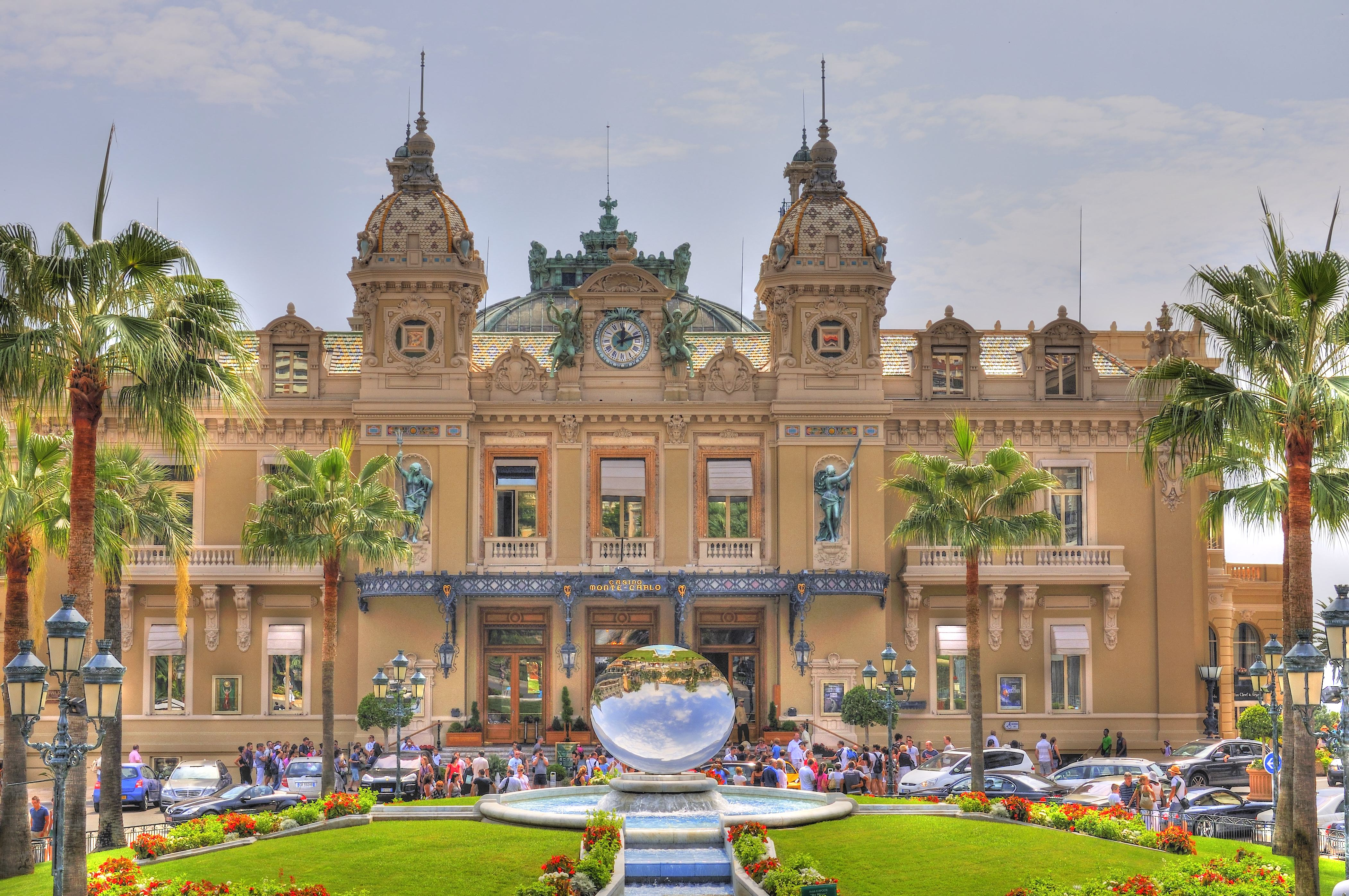 Casinò